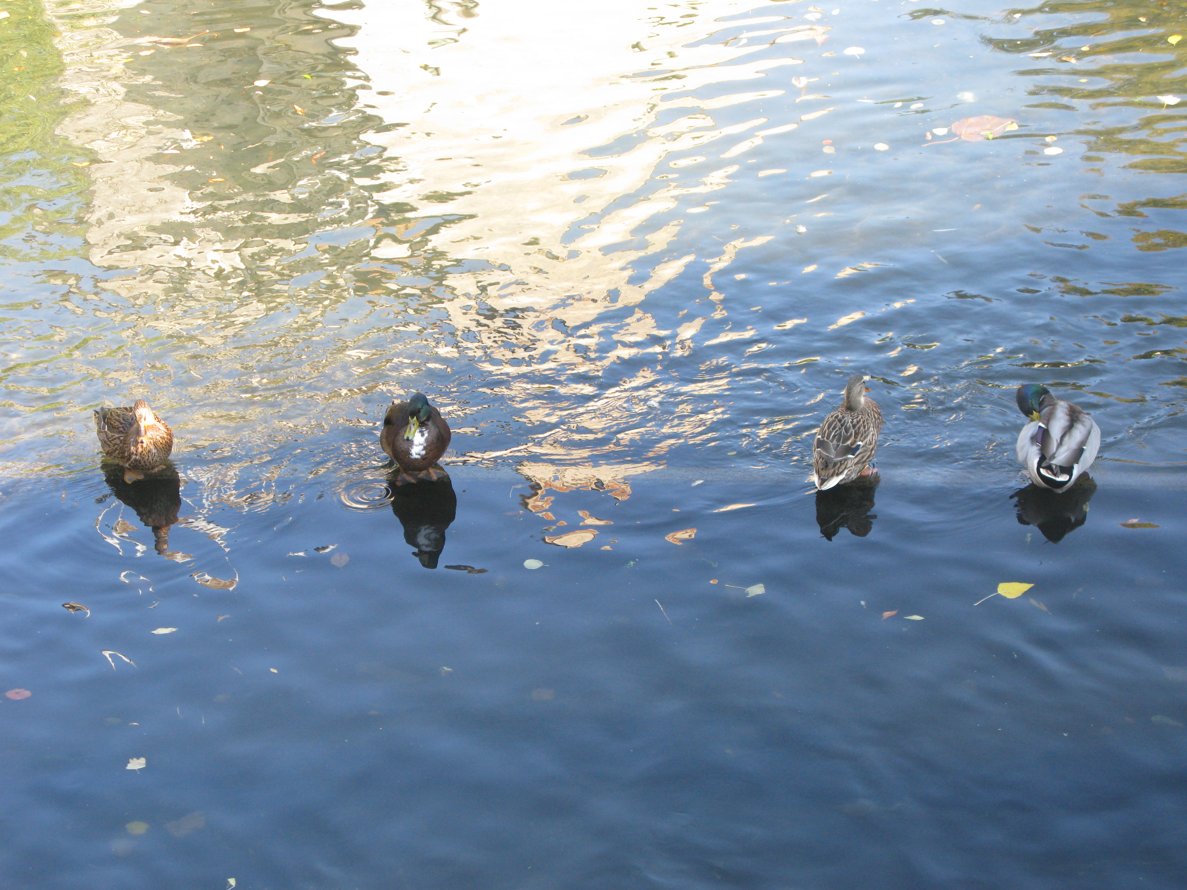 Deux couples de colverts (anas platyrhynchos) dans l'Iton à Évreux.